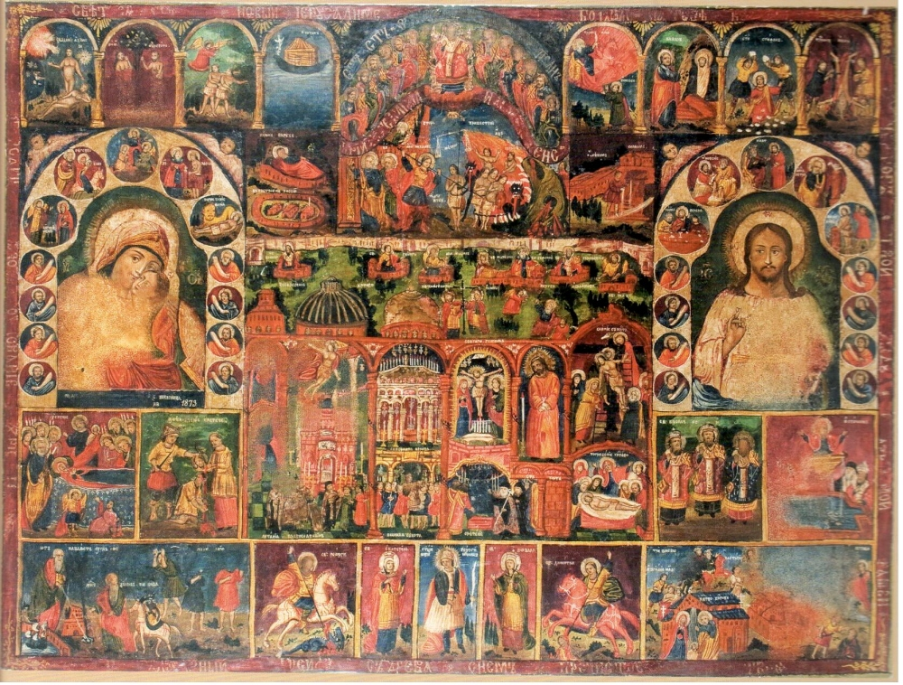 «Иерусалимия»